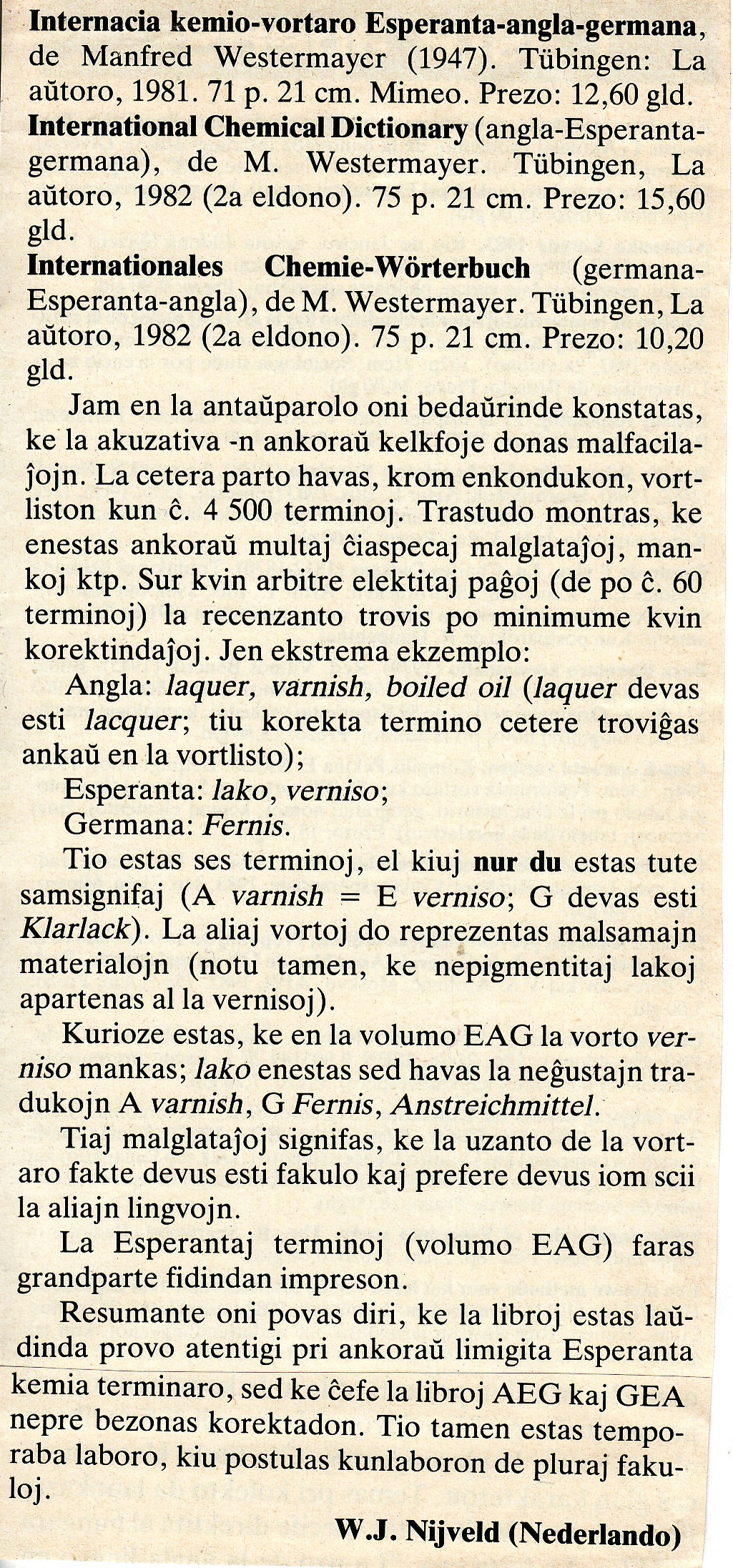 Esperanta Kemia Vortaro Westermayer